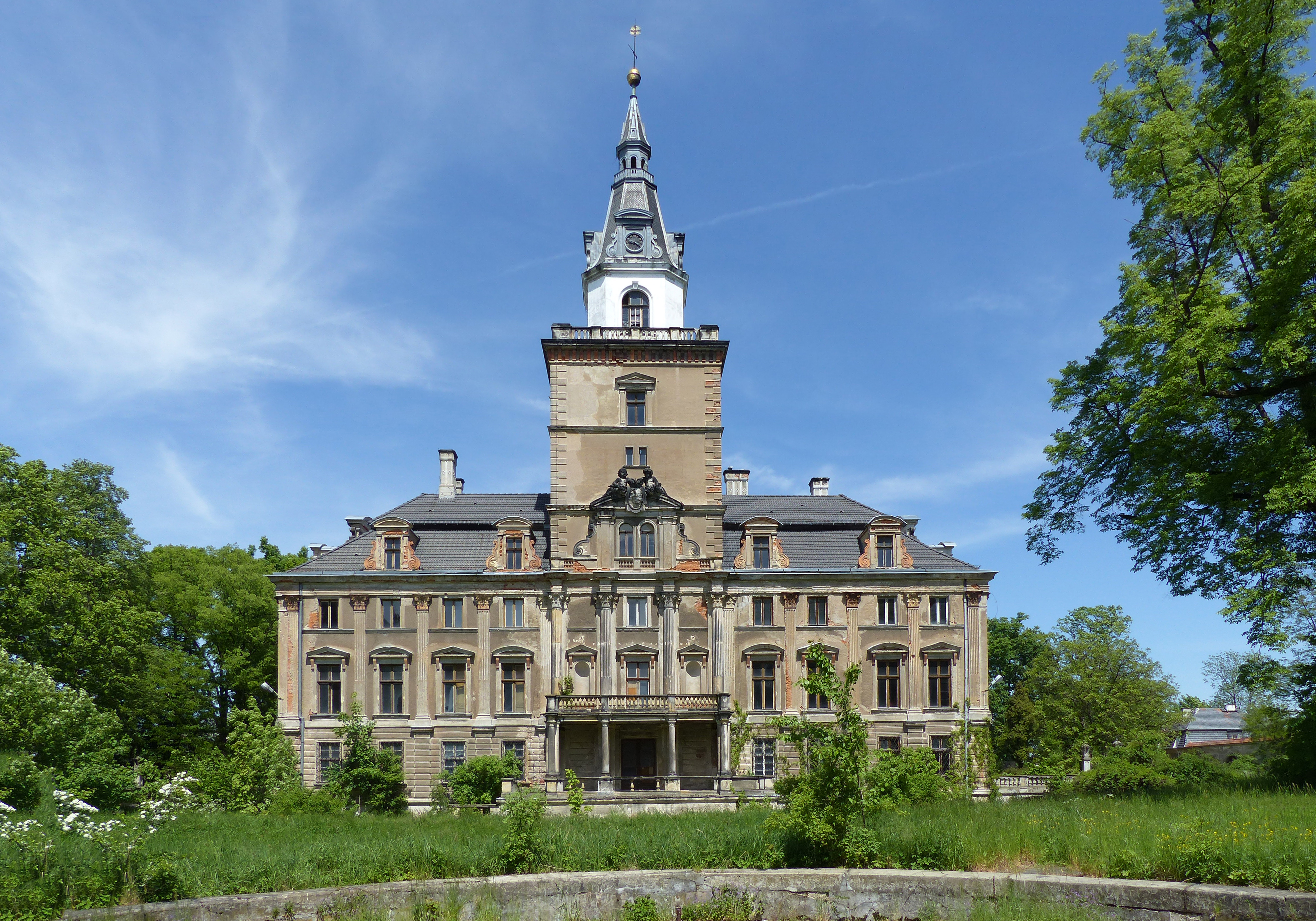 Roztoka, pałac, 1 poł. XVIII, XIX